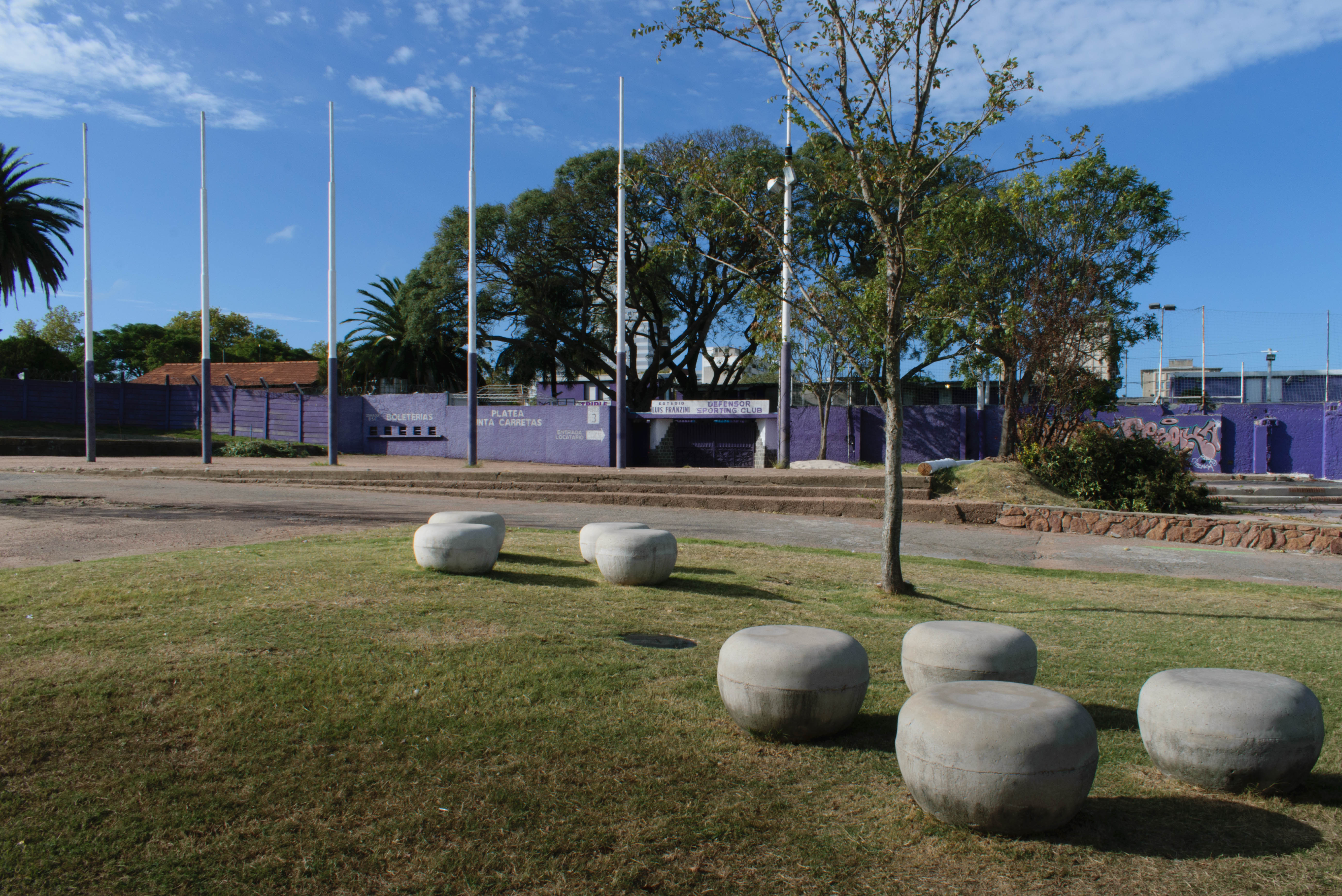 Parte del proyecto Marcas de la memoria